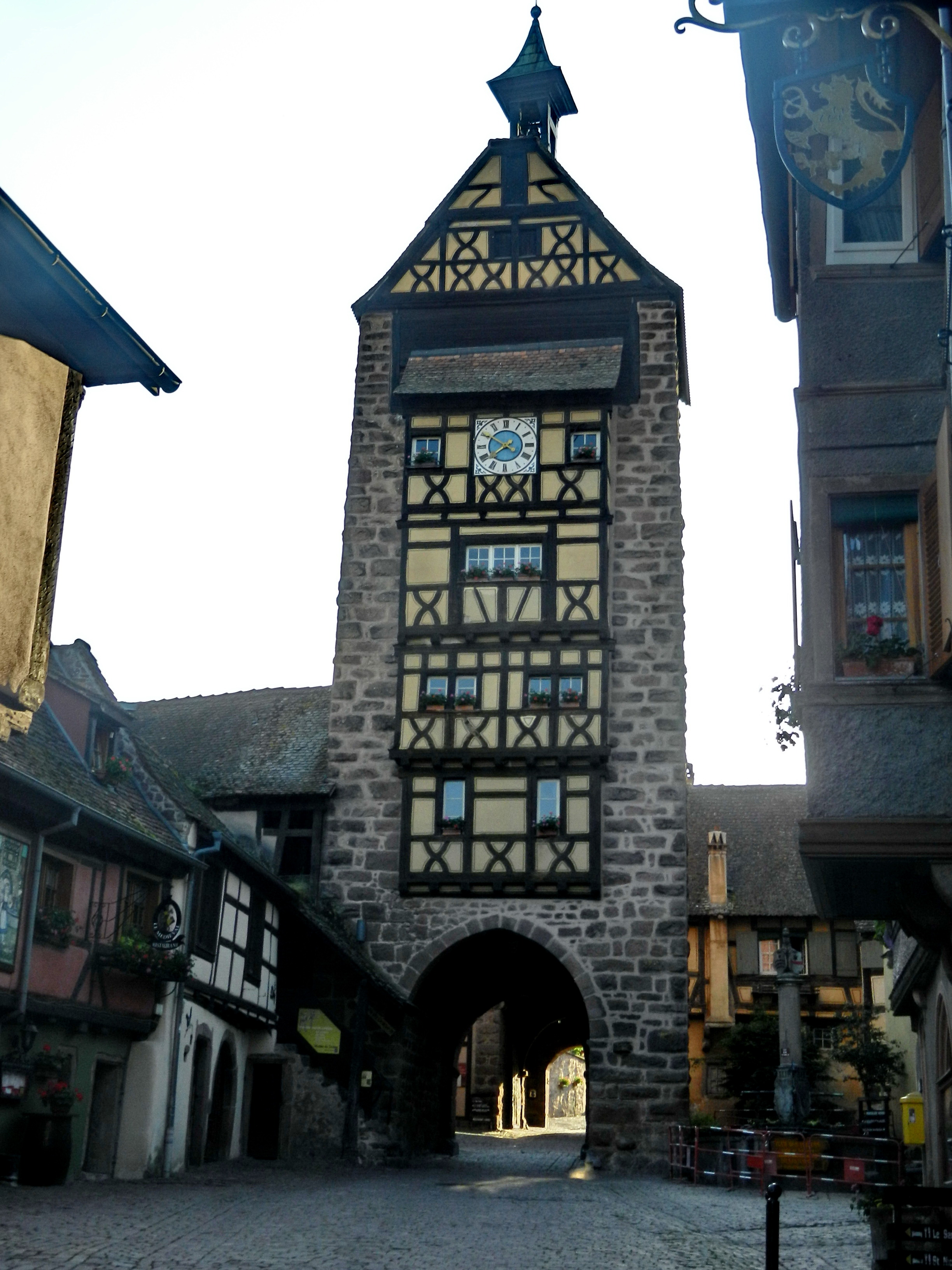 Риквир, Франция